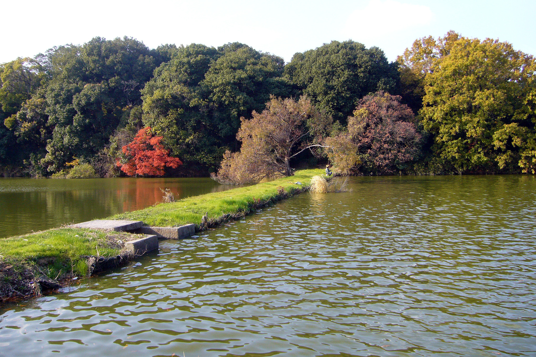 Kawachi-Otsukayama kofun in Habikino, Osaka, Japan